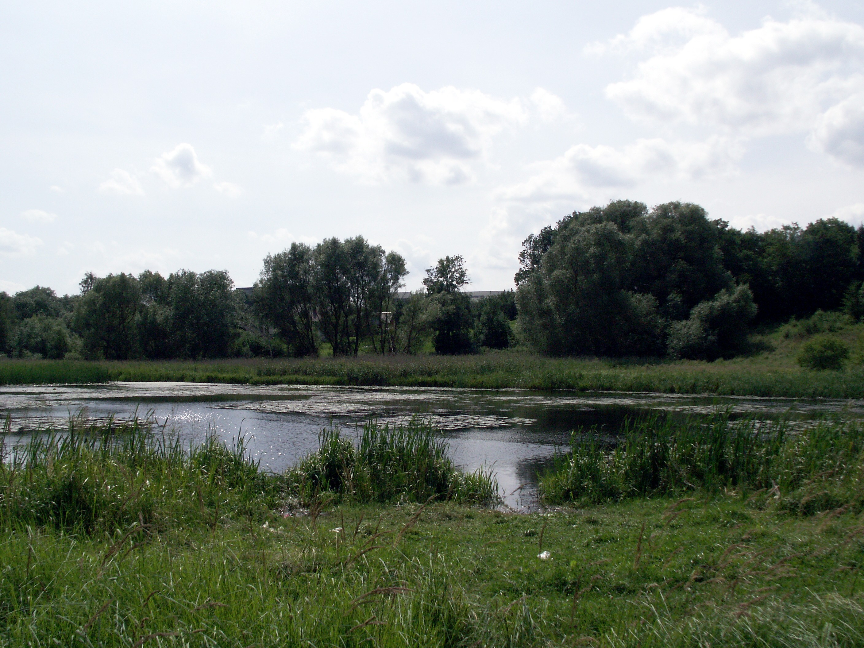 Kompelis, Šiauliai